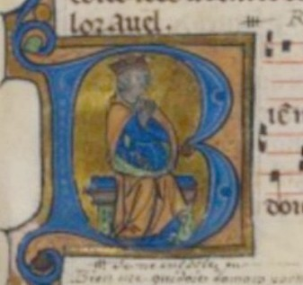 Thibaud Ier de Navarre